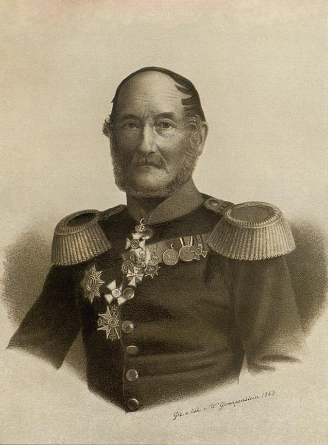 Johann Ludwig Mosle, vermutlich als oldenburgischer Generalmajor Mitte der 1860er Jahre